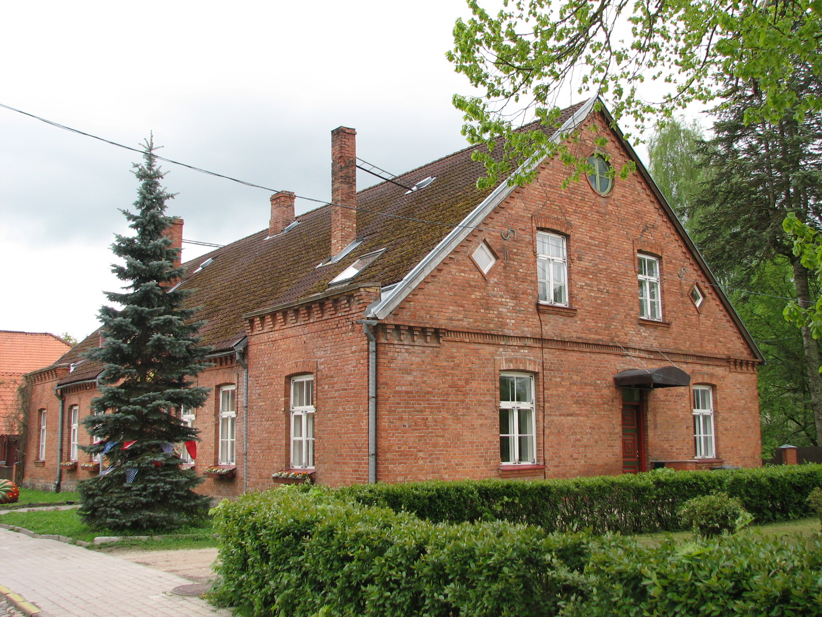 typische Architektur in Viljandi: rote Ziegelsteinhäuser mit zwei rautenförmigen Fernster im Dachgeschoss an der Giebelwand.